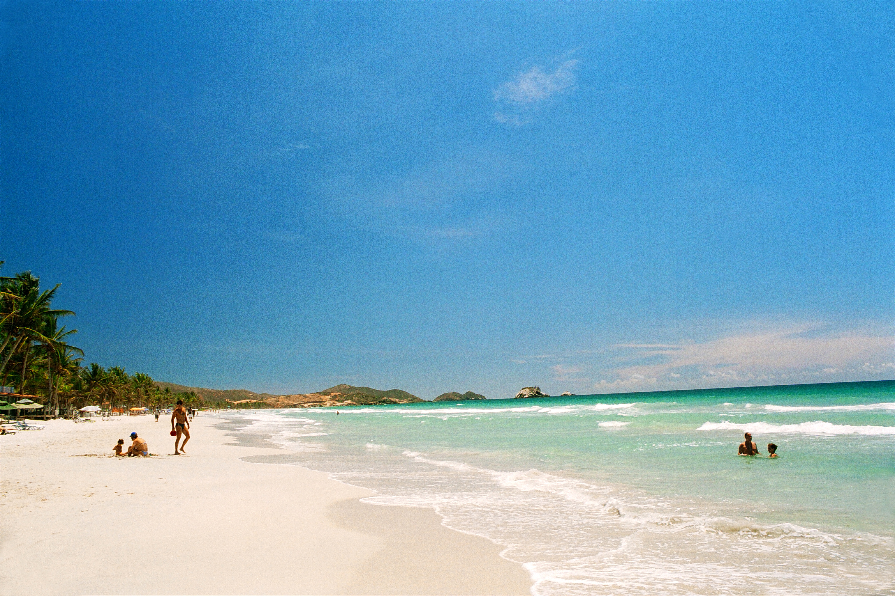 Playa El Agua, Isla de Margarita, Venezuela.